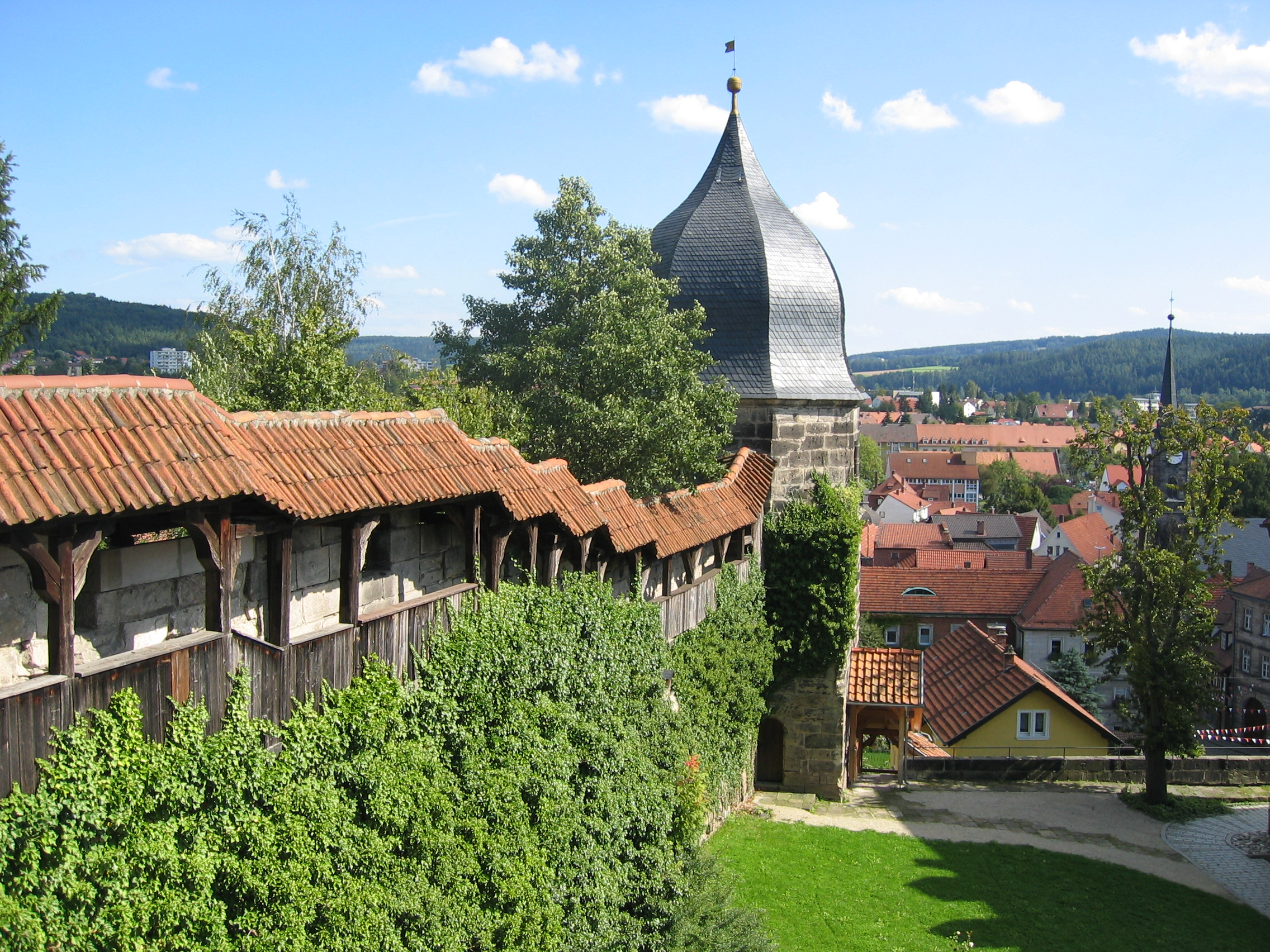 Kronach - Hexenturm